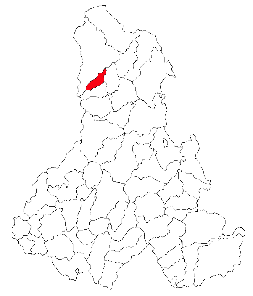 Categorie:Hărţi ale judeţului Harghita Contents 1 Licensing 2 Sursă 3 Licensing 4 Original upload log Licensing Sursă ro::Imagine:Harta_jud_Harghita.png